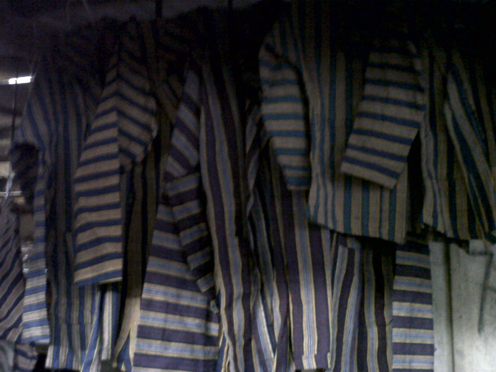 Pakaian Surjan